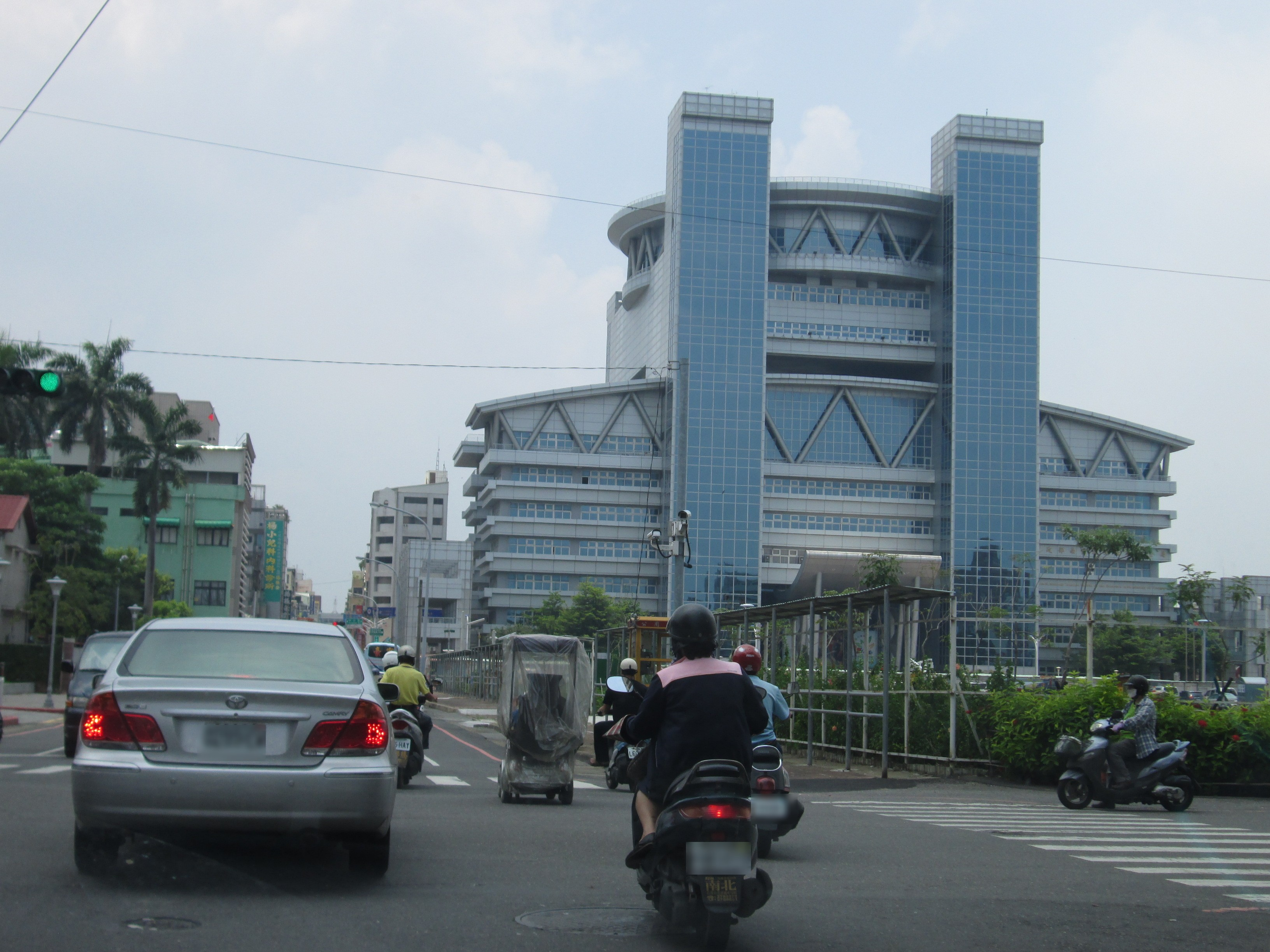 嘉義市 嘉義市政府大樓